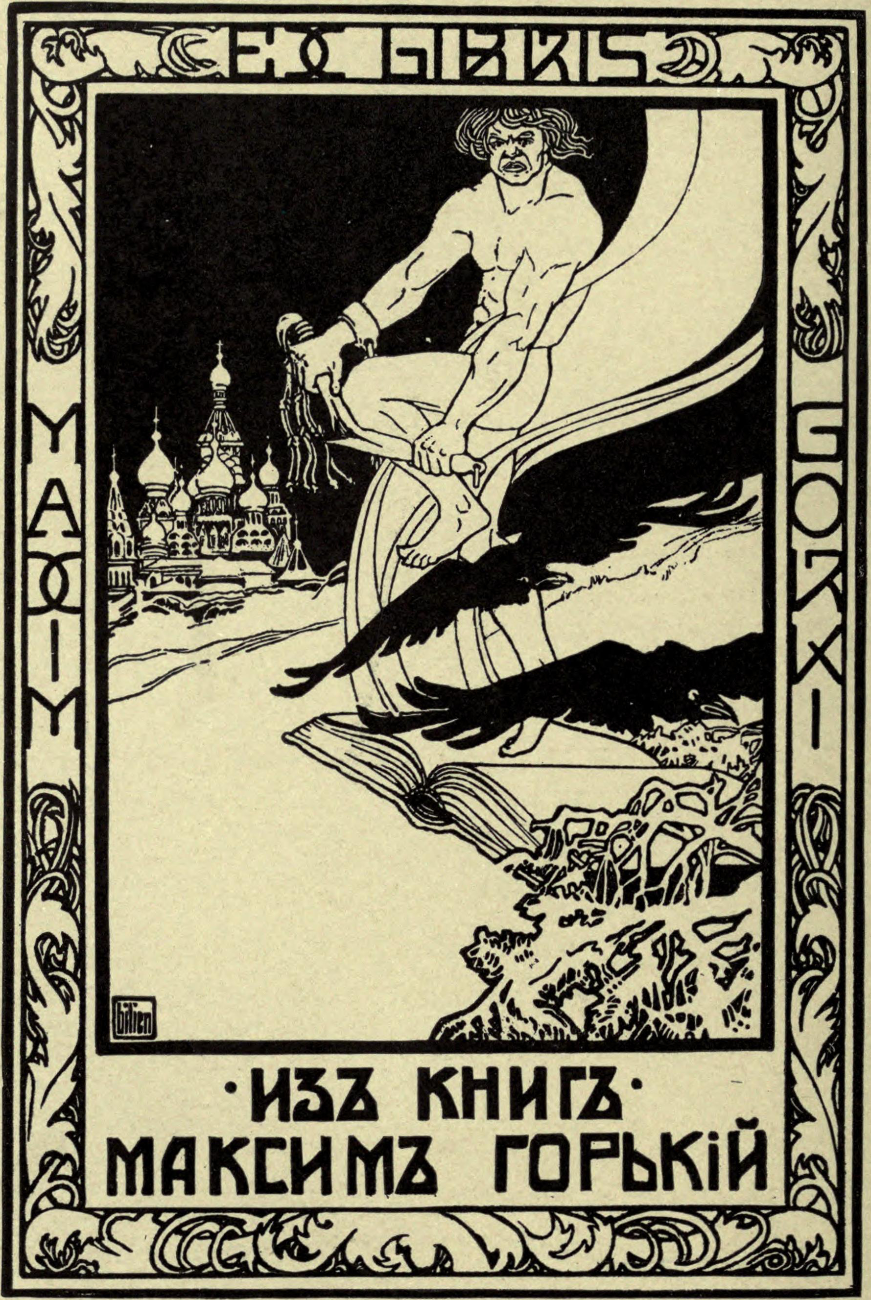 Ex Libris Maxim Gorki